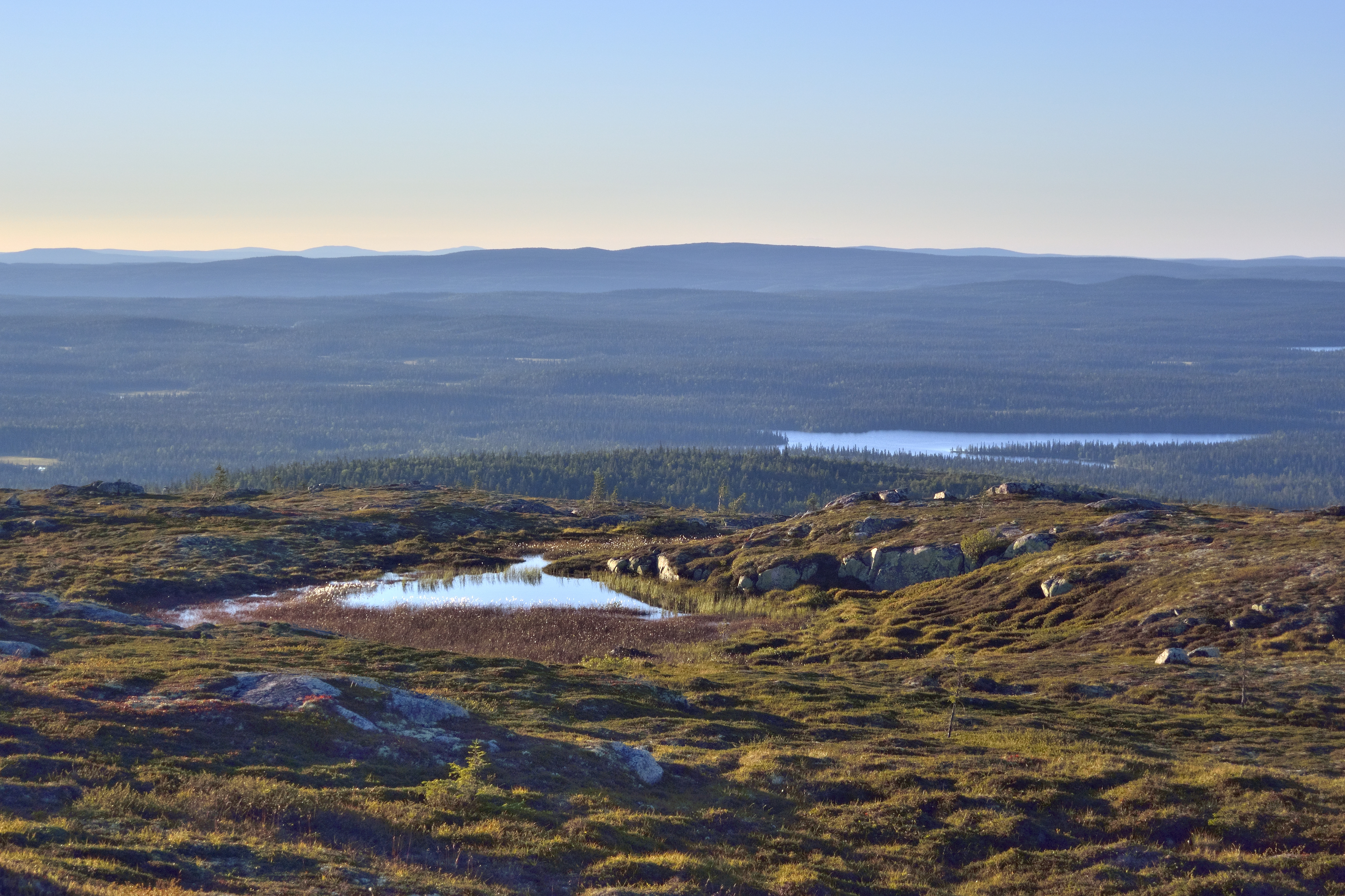 Паанаярви: Западная граница национального парка совпадает с государственной границей России с Финляндией. Со стороны финской границы к “Паанаярви” примыкает национальный парк “Оуланка”,Лоухский район, This image is related to the protected area of Russia number 1000069